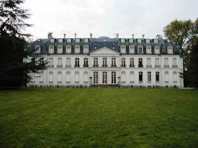 Façade du château de Voisenon (77)